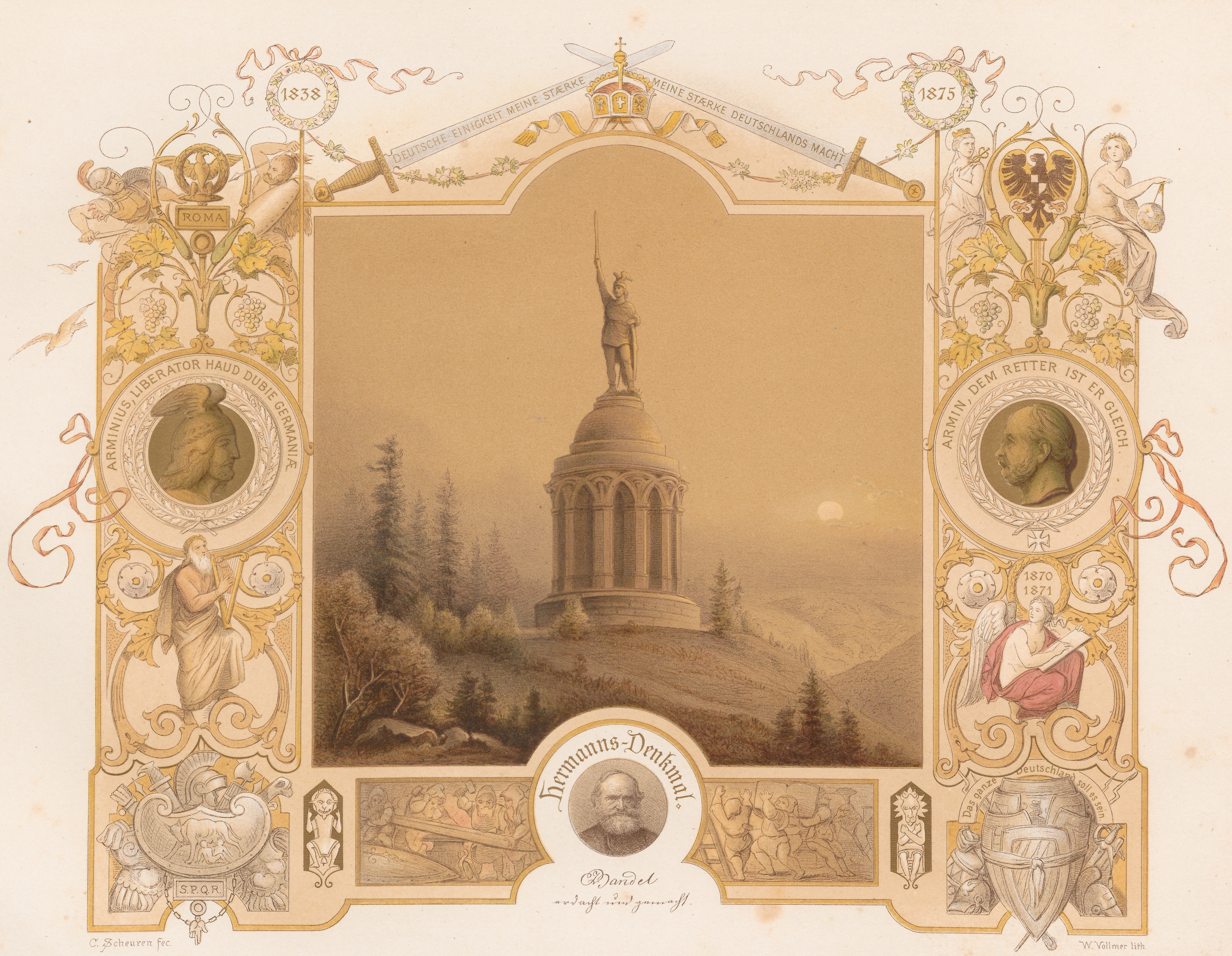 Hermannsdenkmal